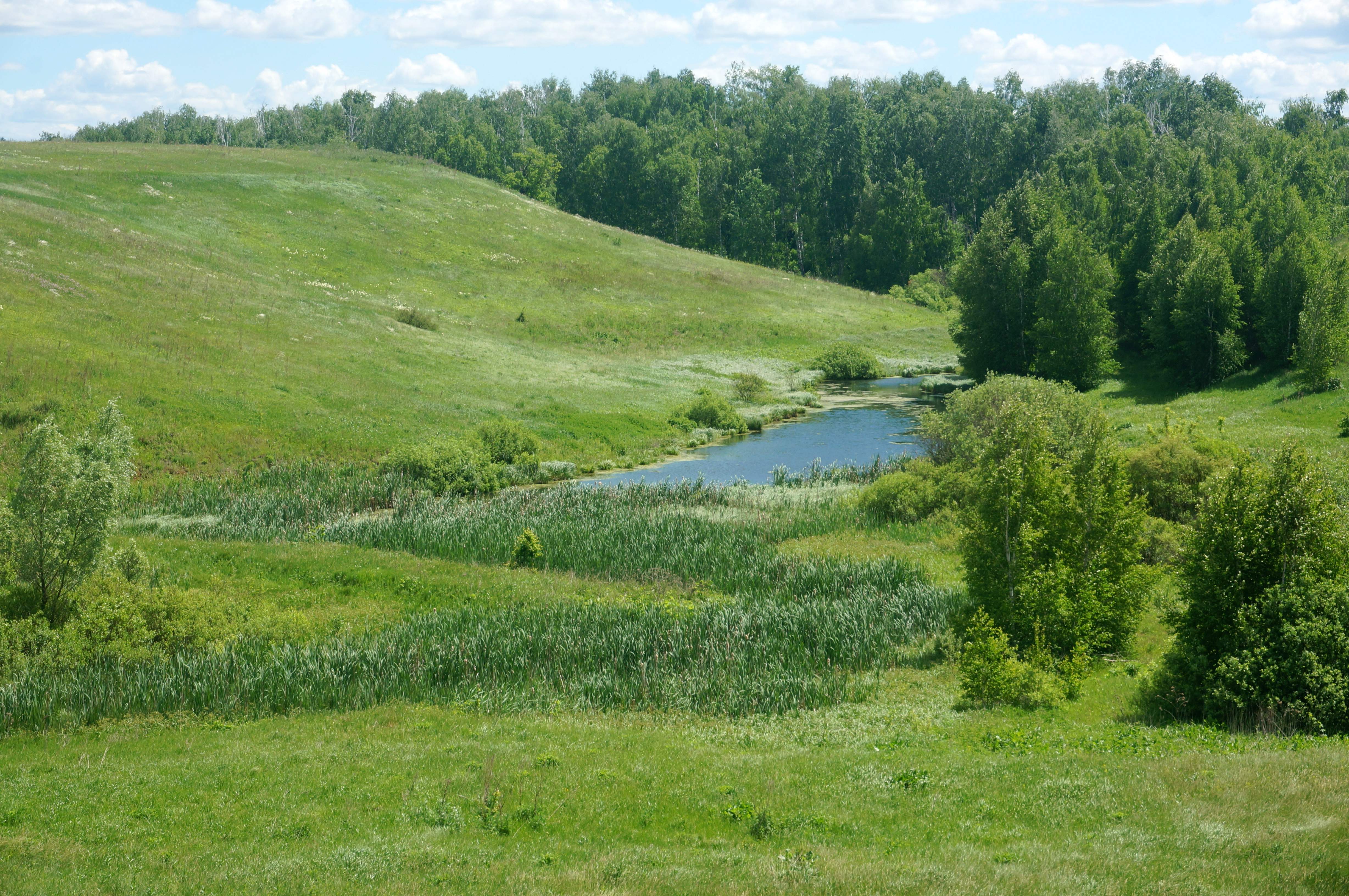 Река Мусорка, Ставропольский район Самарской области, Россия